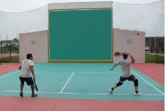 deporte peruano